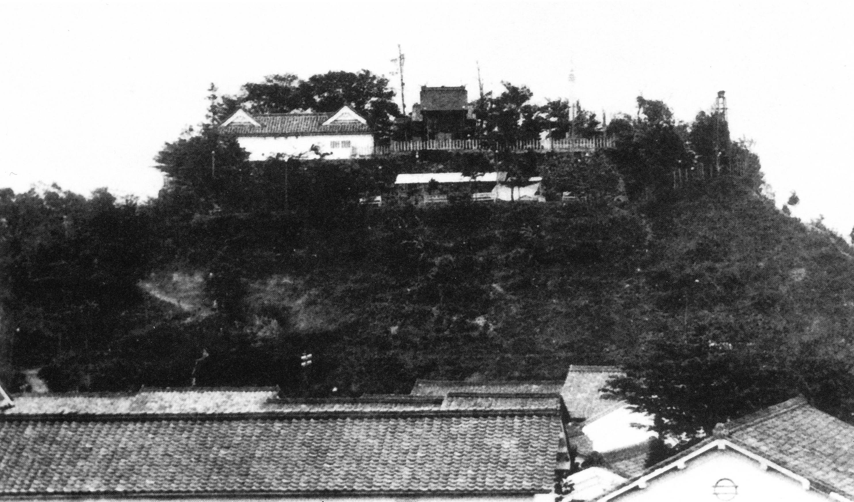 本丸東側